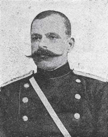 Портрет на Христо Саракинов.